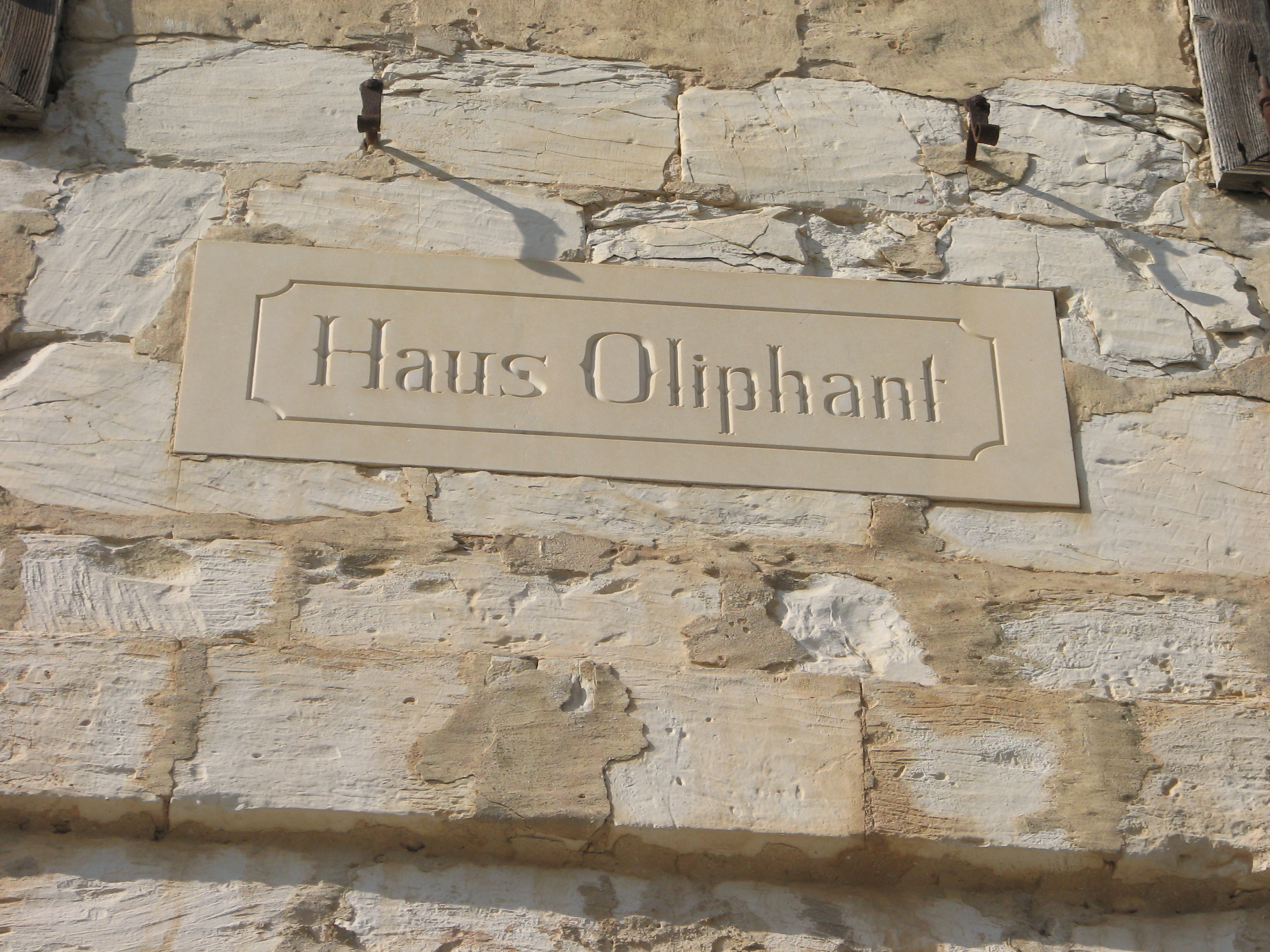 Beit Oliphent, Haifa. The house of Laurence Oliphant . בית אוליפנט במושבה הגרמנית בחיפה שדרות בן גוריון 16 ביתו של לורנס אוליפנט לוח אבן עם ציון בית אוליפנט בקומה השנייה מעל הדלת בחזית הבית